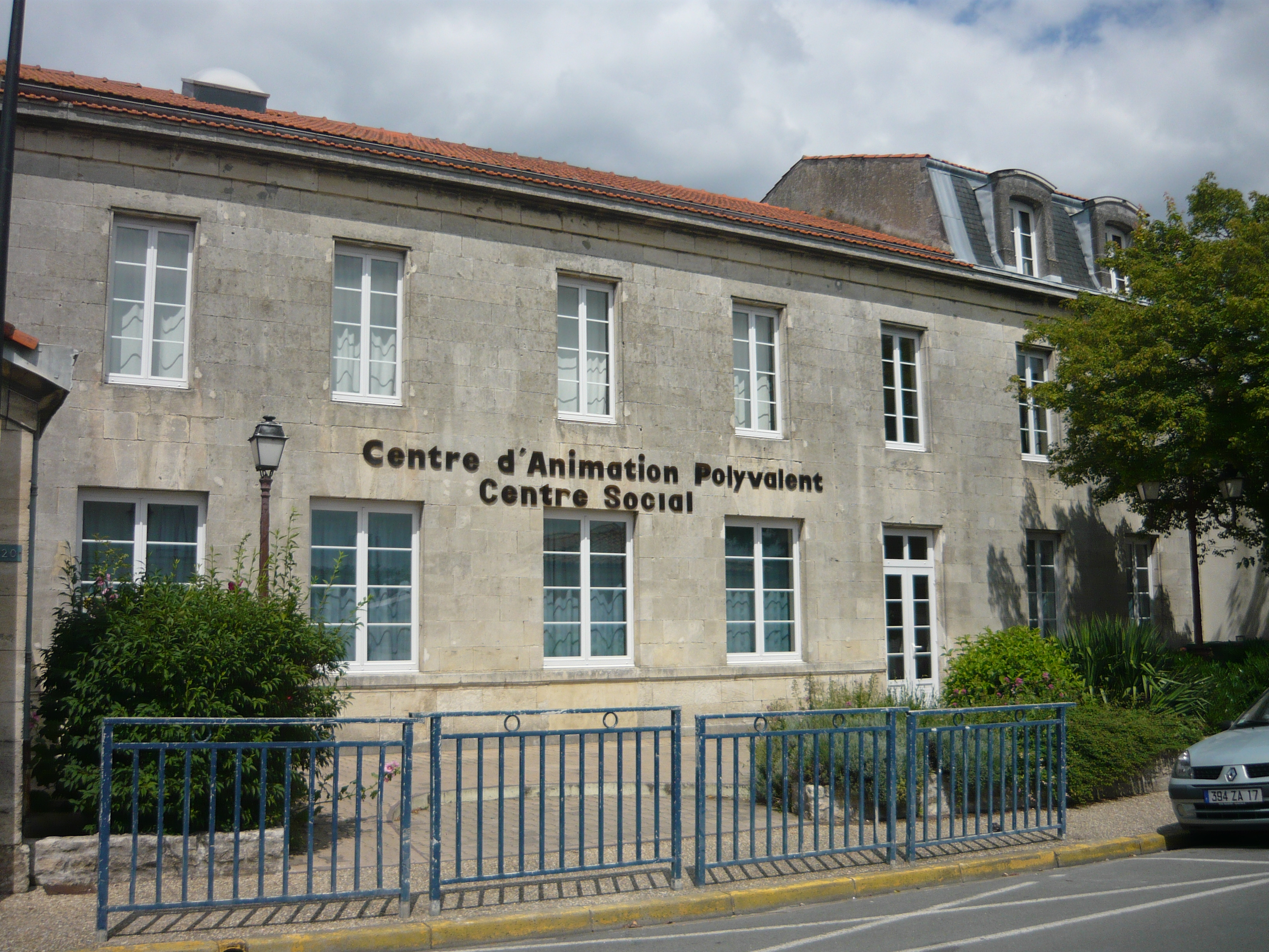 Le Centre social de Tonnay-Charente